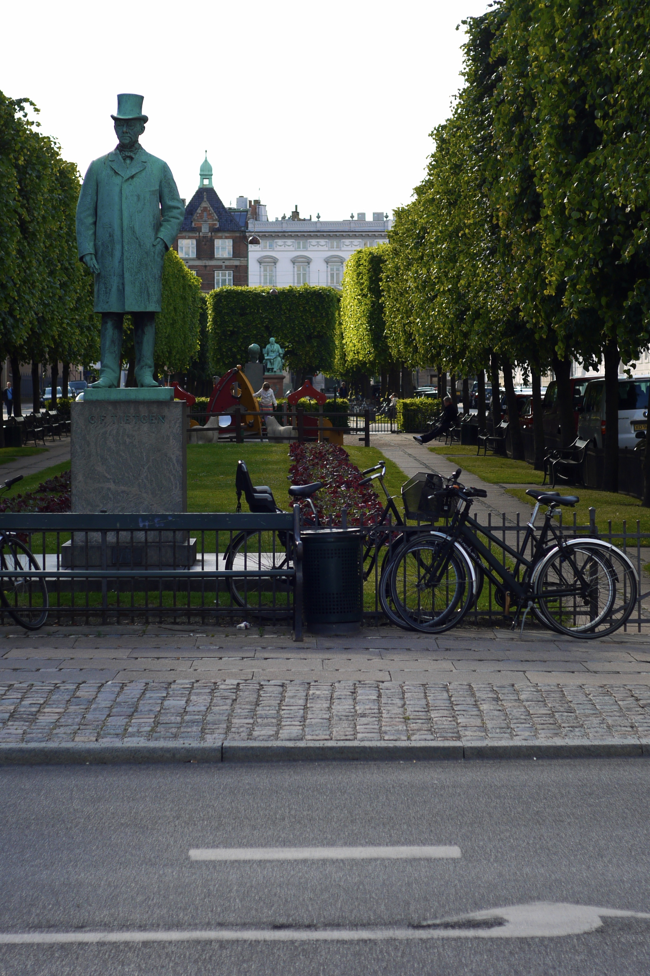 The statue of C. F. Tietgen at Sankt Annæ Plads in Copenhagen, Denmark.